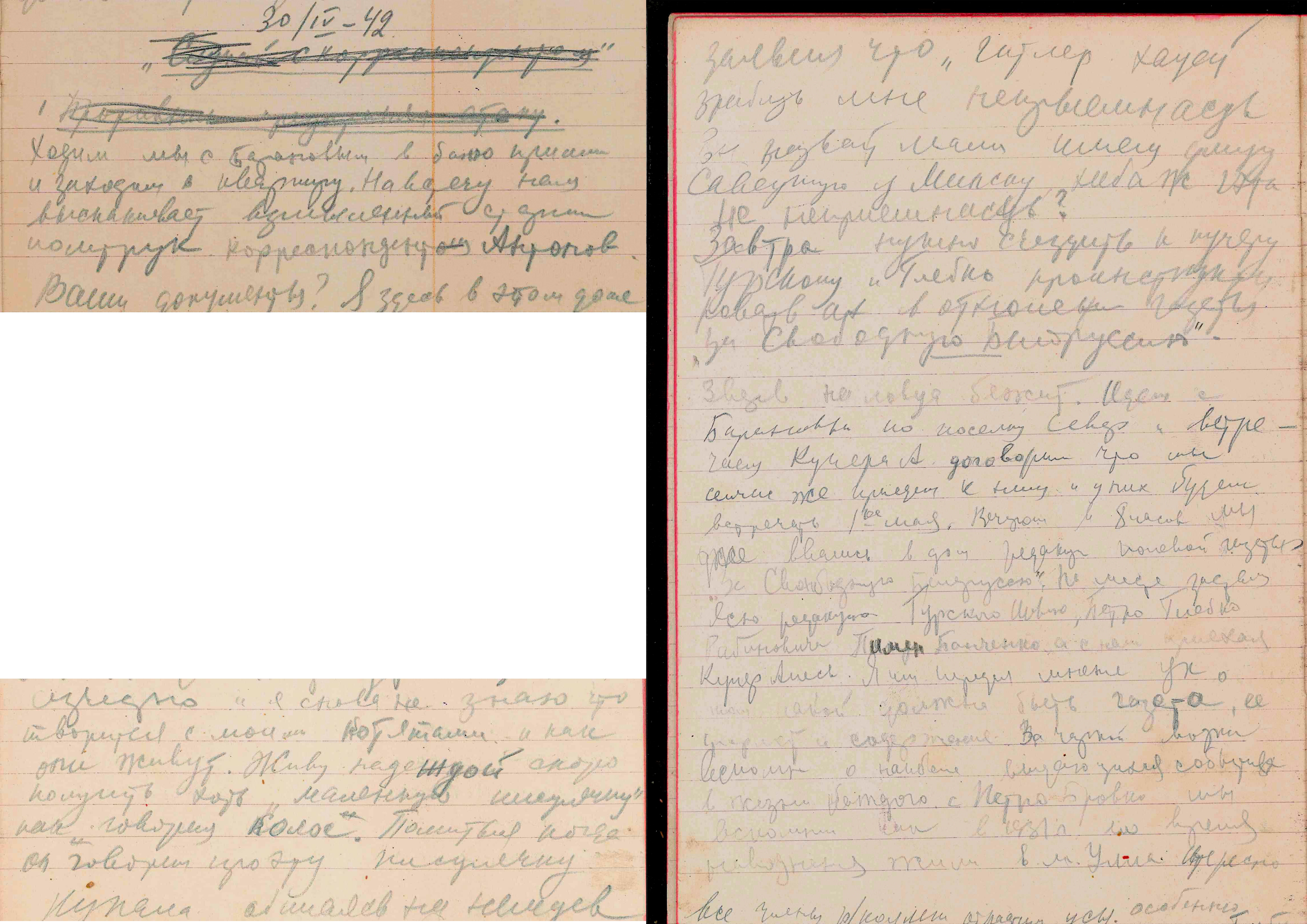 Старонкі з вайсковага дзённіка Мікалая Красоўскага са згадкаю Якуба Коласа і Янкі Купалы